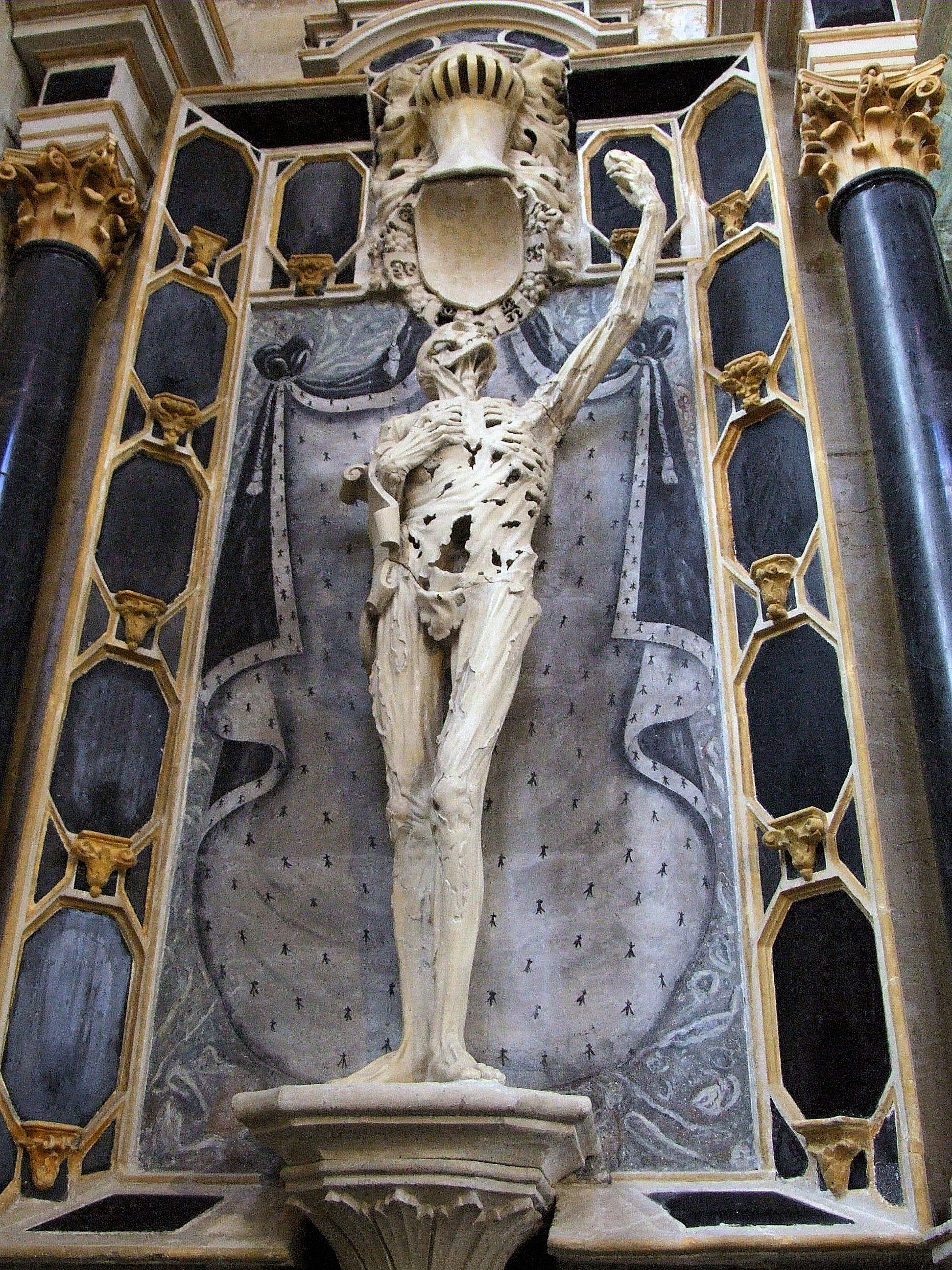 Bar-le-Duc - Eglise Saint-Etienne - Le Transi